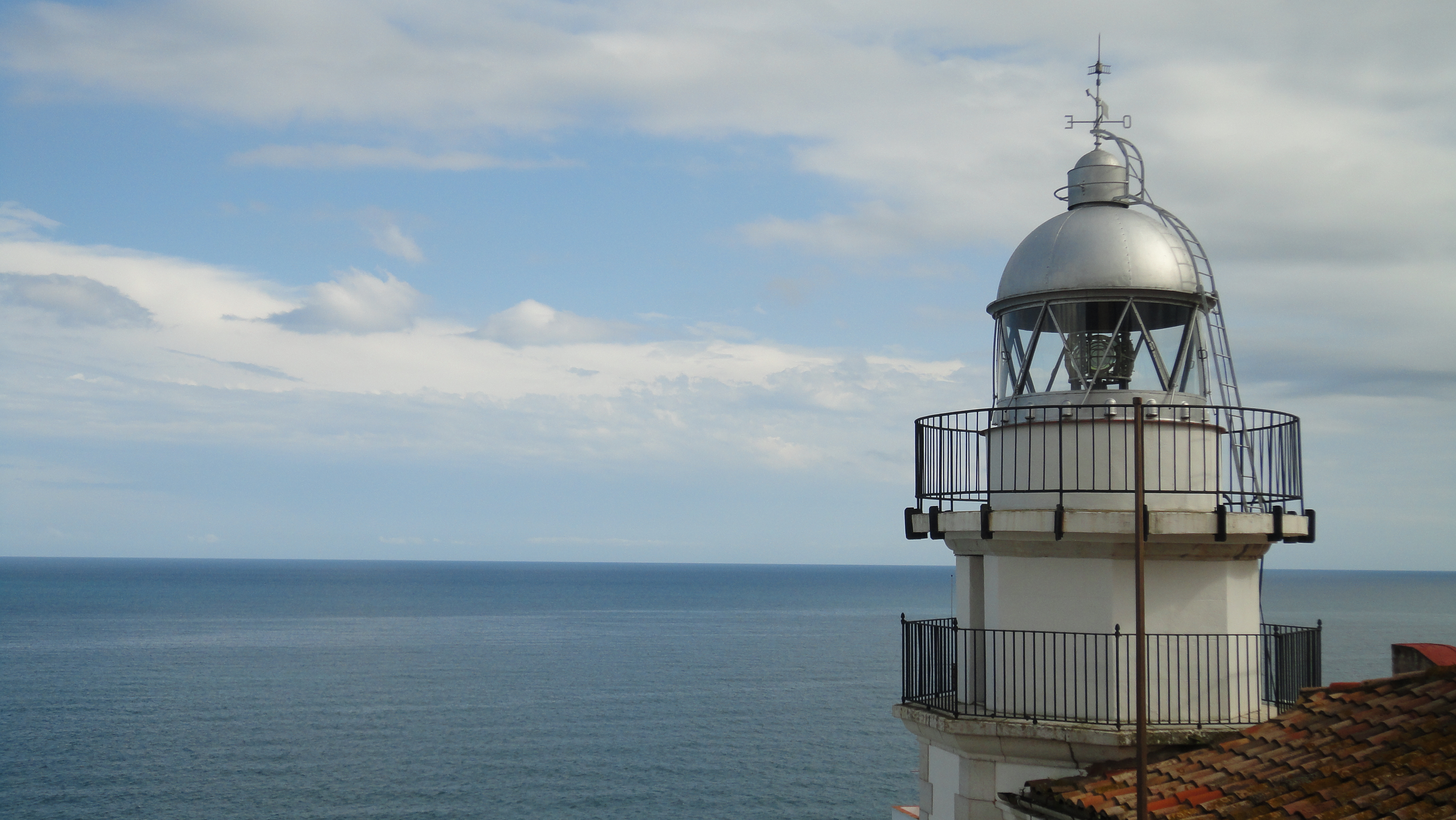 Faro de Peñíscola con el mar Mediterráneo de fondo.